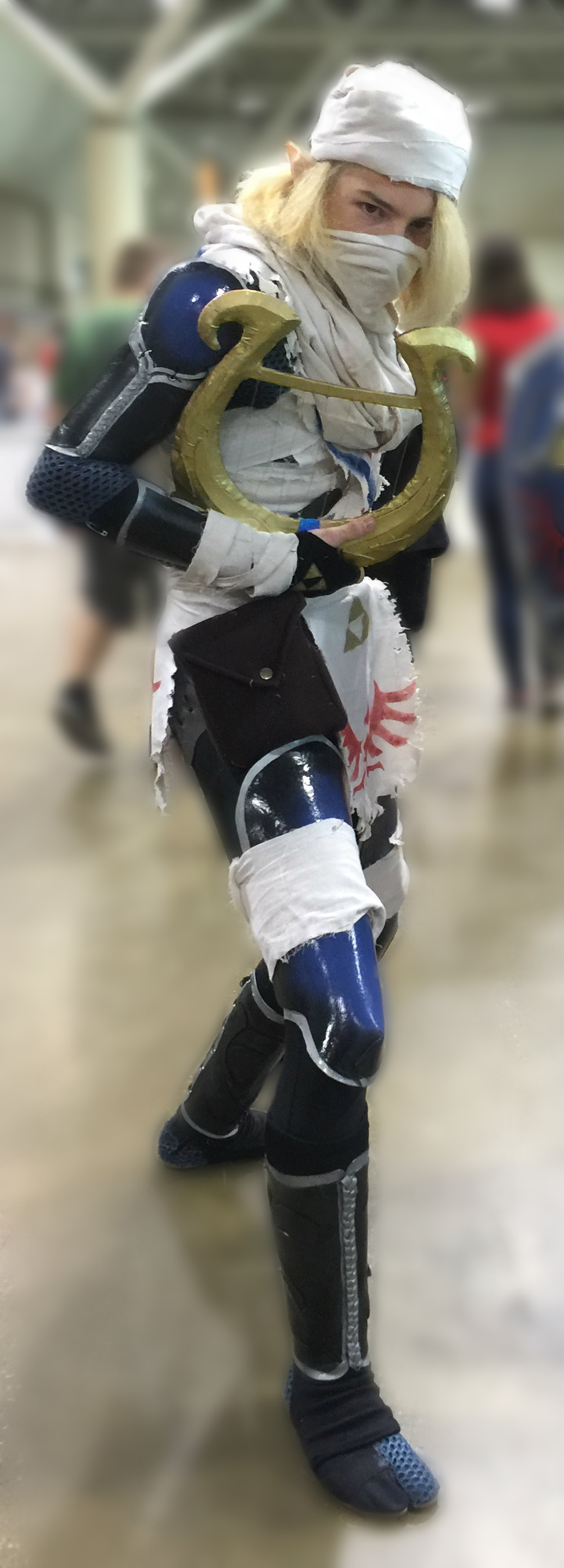 Cosplay de Sheik en Fan Expo Canada 2016